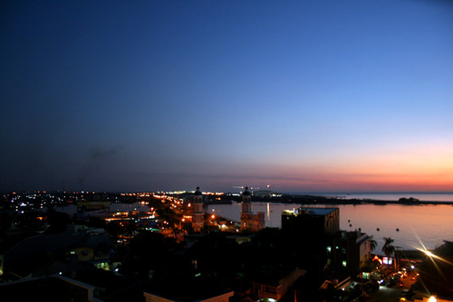 Tanjung Bunga Bay Skyline